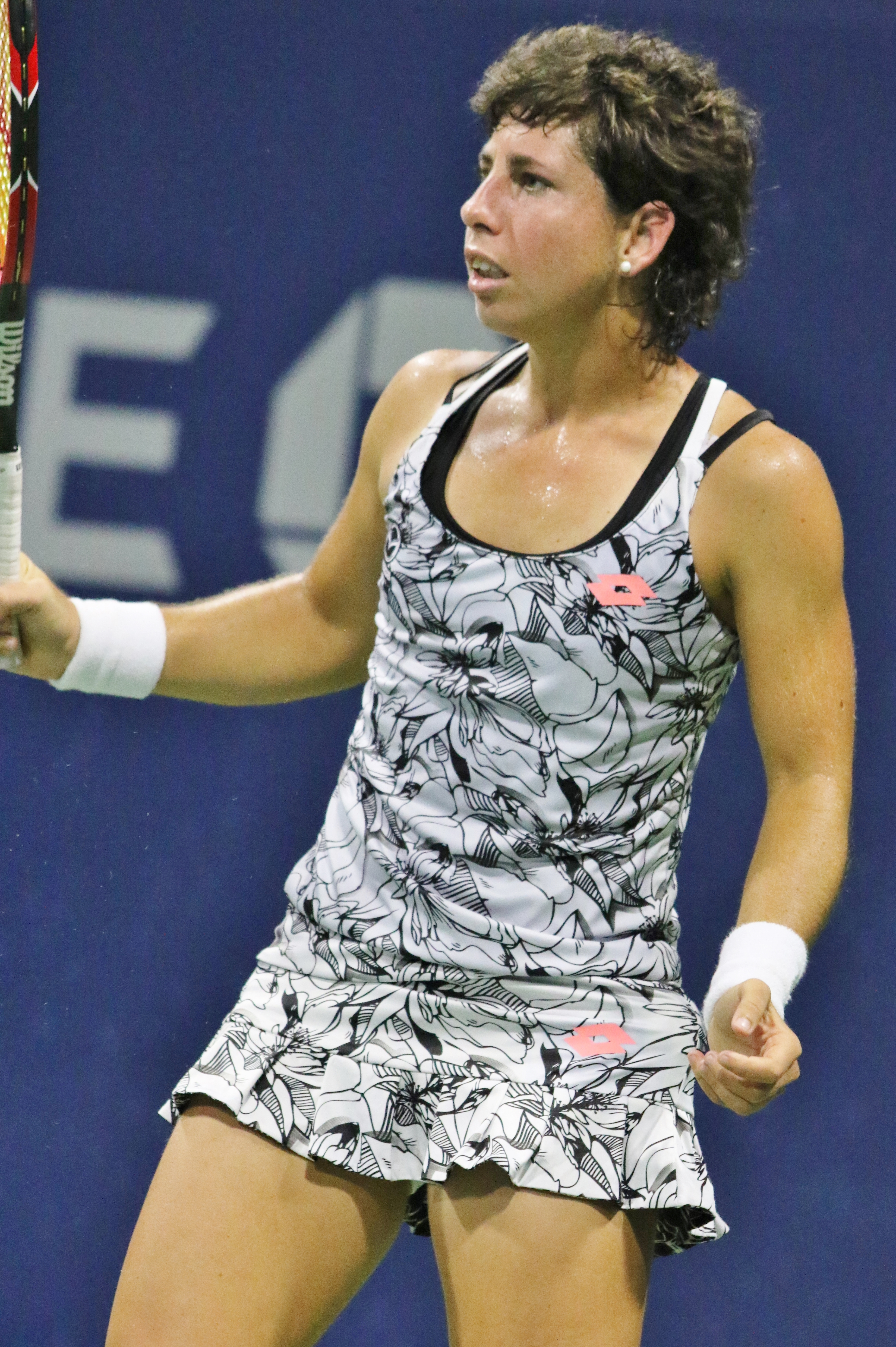 Suarez Navarro US16 (16)